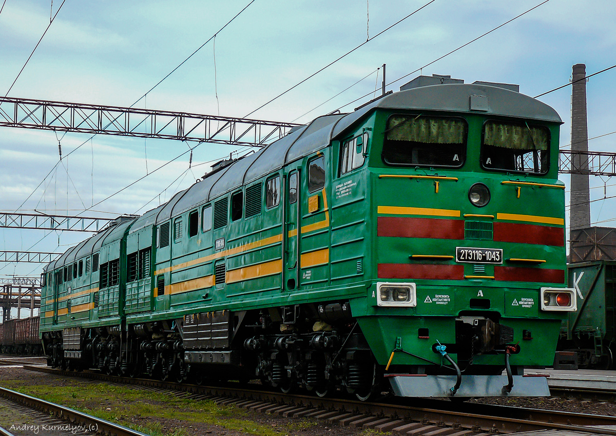 Секция 1043А на 09.2013 г. б/з Чернухино (ожидание КР-1) Секция 1043Б на 09.2013 г. б/з Чернухино (неиспр.) Поврежден во время военных действий.